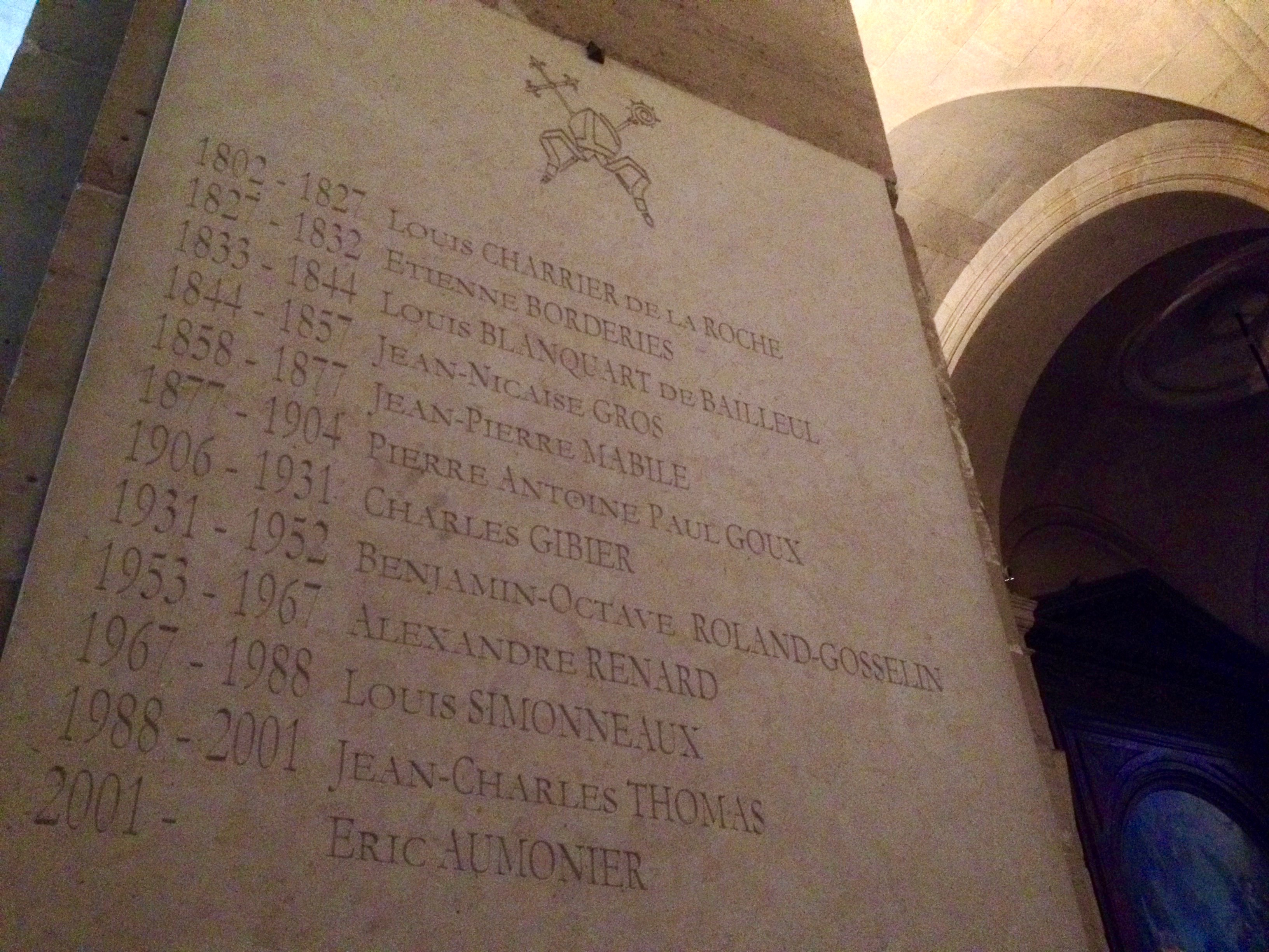 une liste des évêques dans la cathédrale St Louis de Versailles